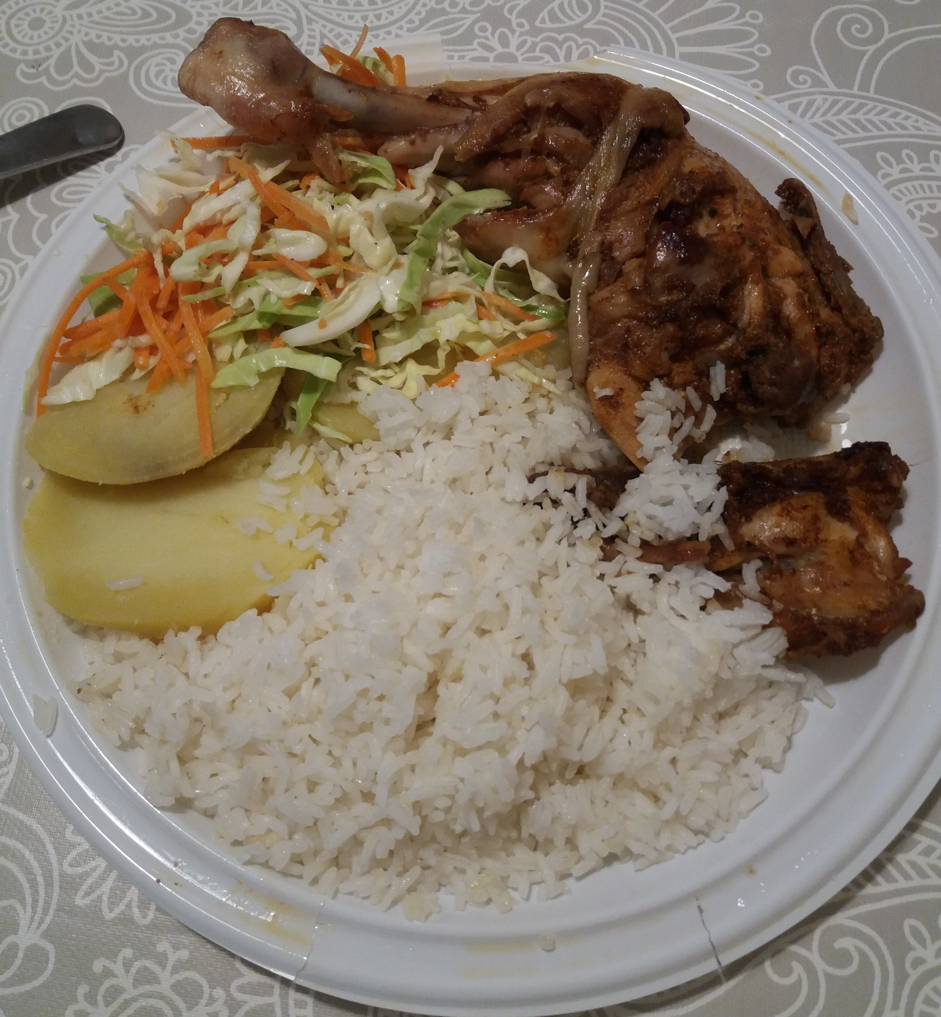 Plato de pollada peruana con arroz, papa cocida y ensalada